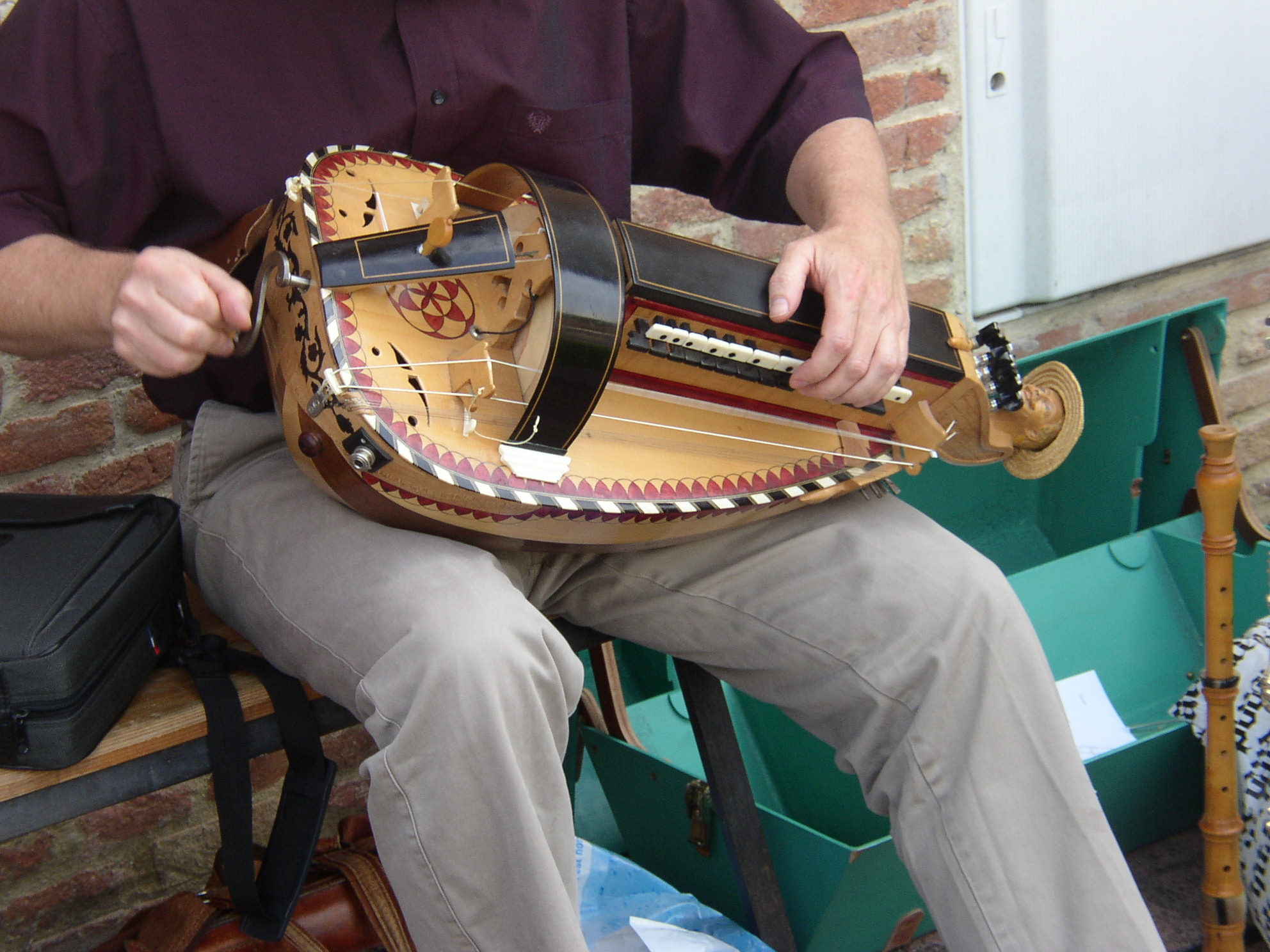 Photo prise à Donneville (France)